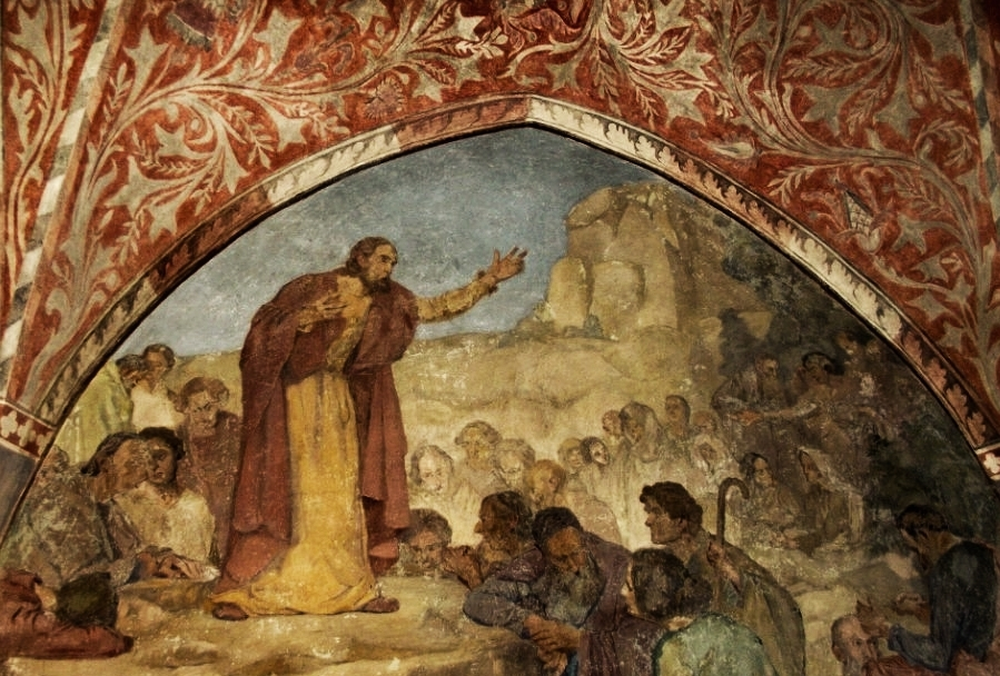 Kirche Marsow, Wandmalerei